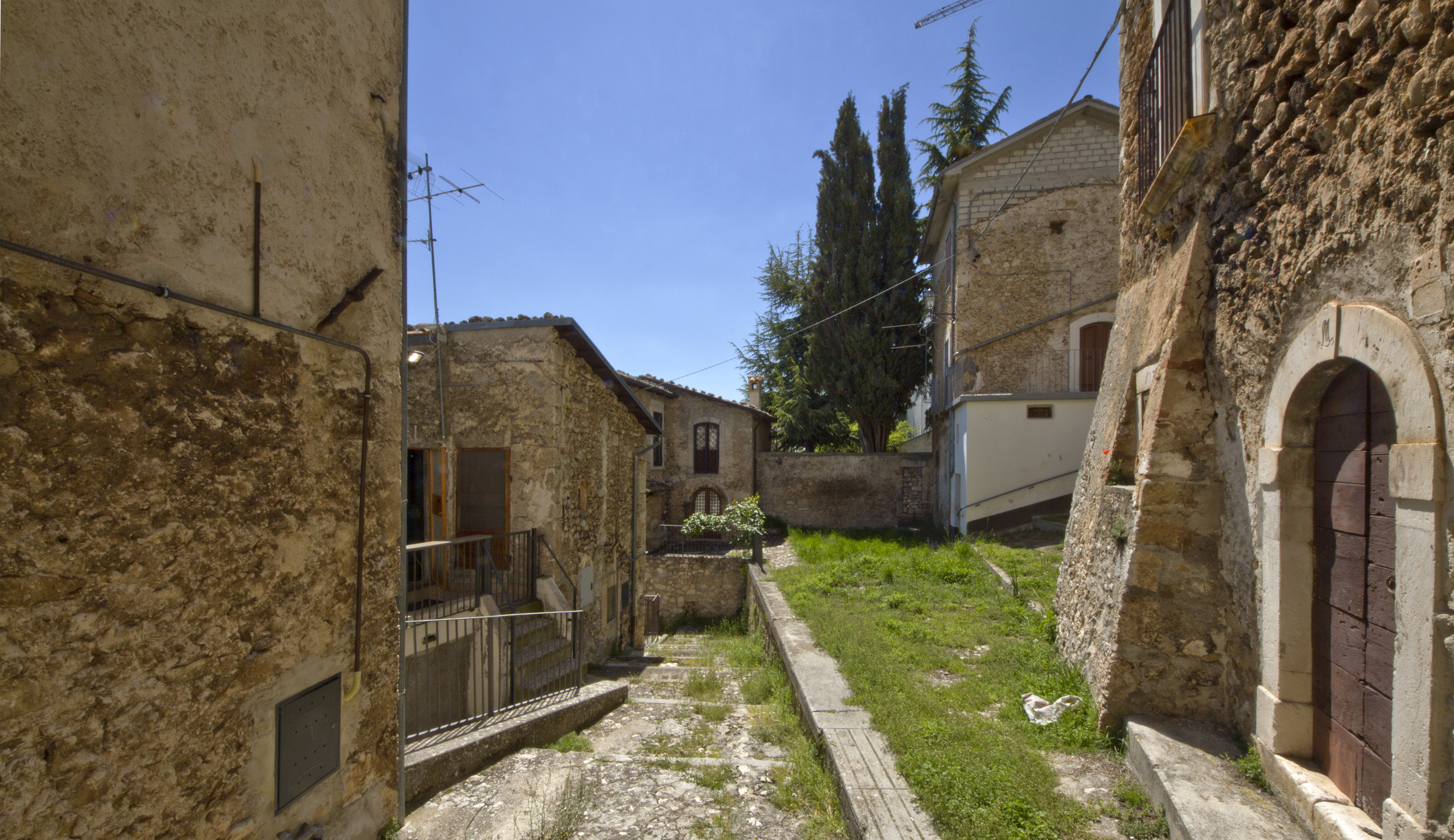 67020 Calascio AQ, Italy